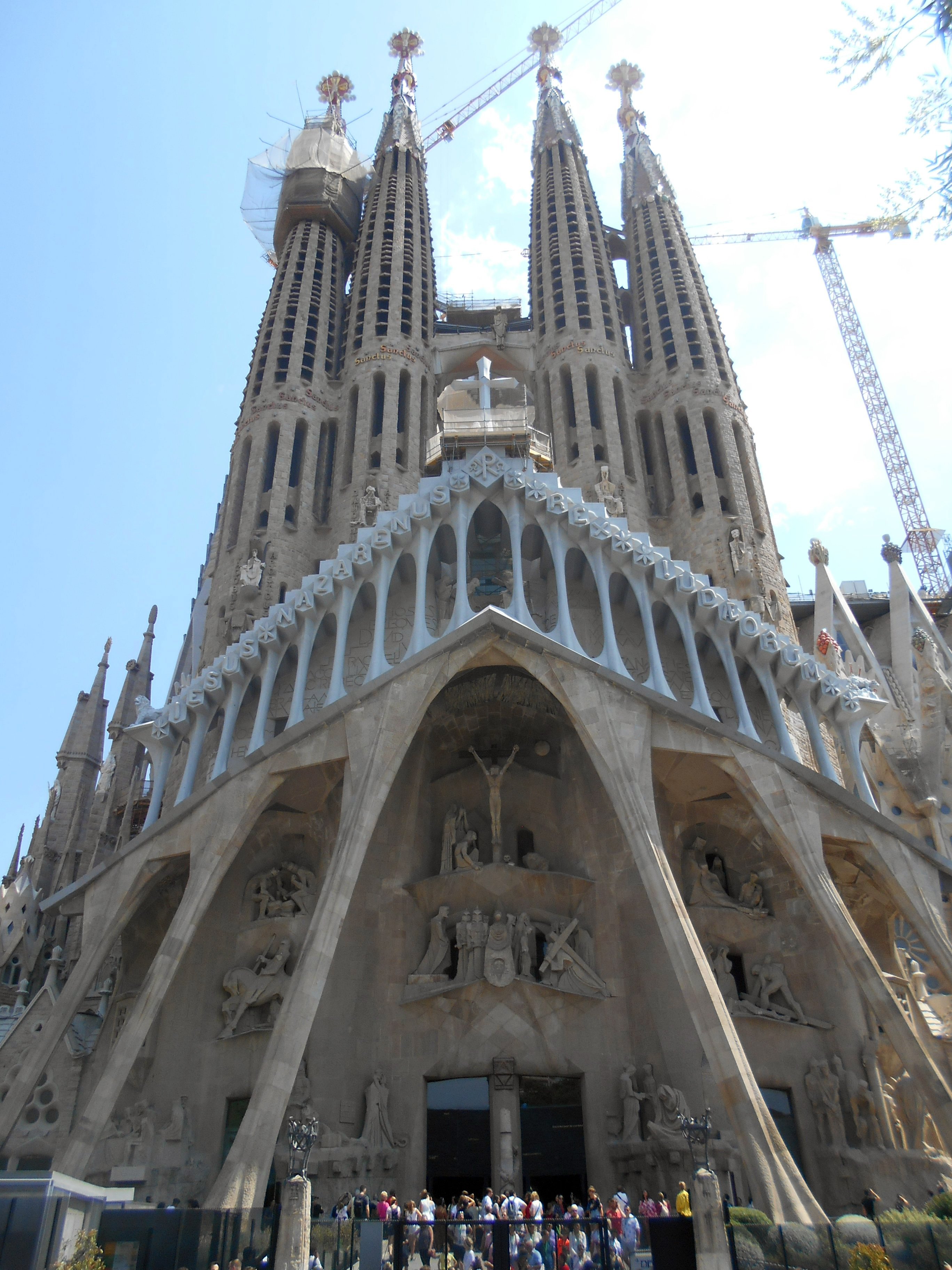 Fachada de la Pasión.